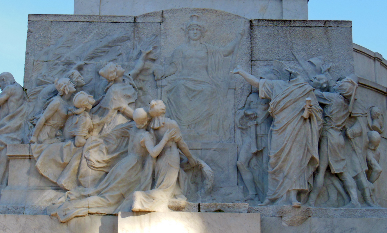 Roma, Monumento a Giuseppe Mazzini di Ettore Ferrari, sculture del basamento, rilievi sul lato destro